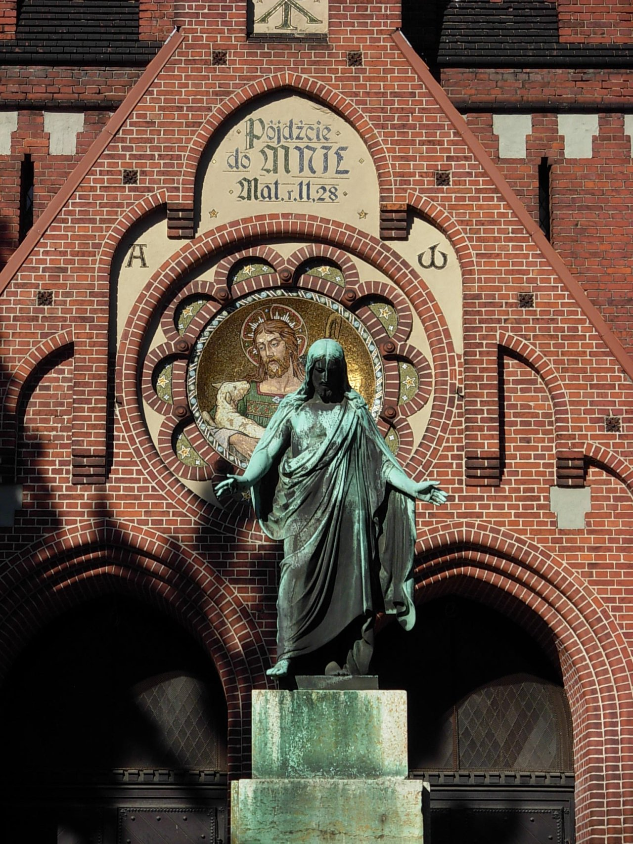 Kościół Chrystusa Zbawiciela w Bydgoszczy - figura Chrystusa, kopia rzeźby z Kopenhagi